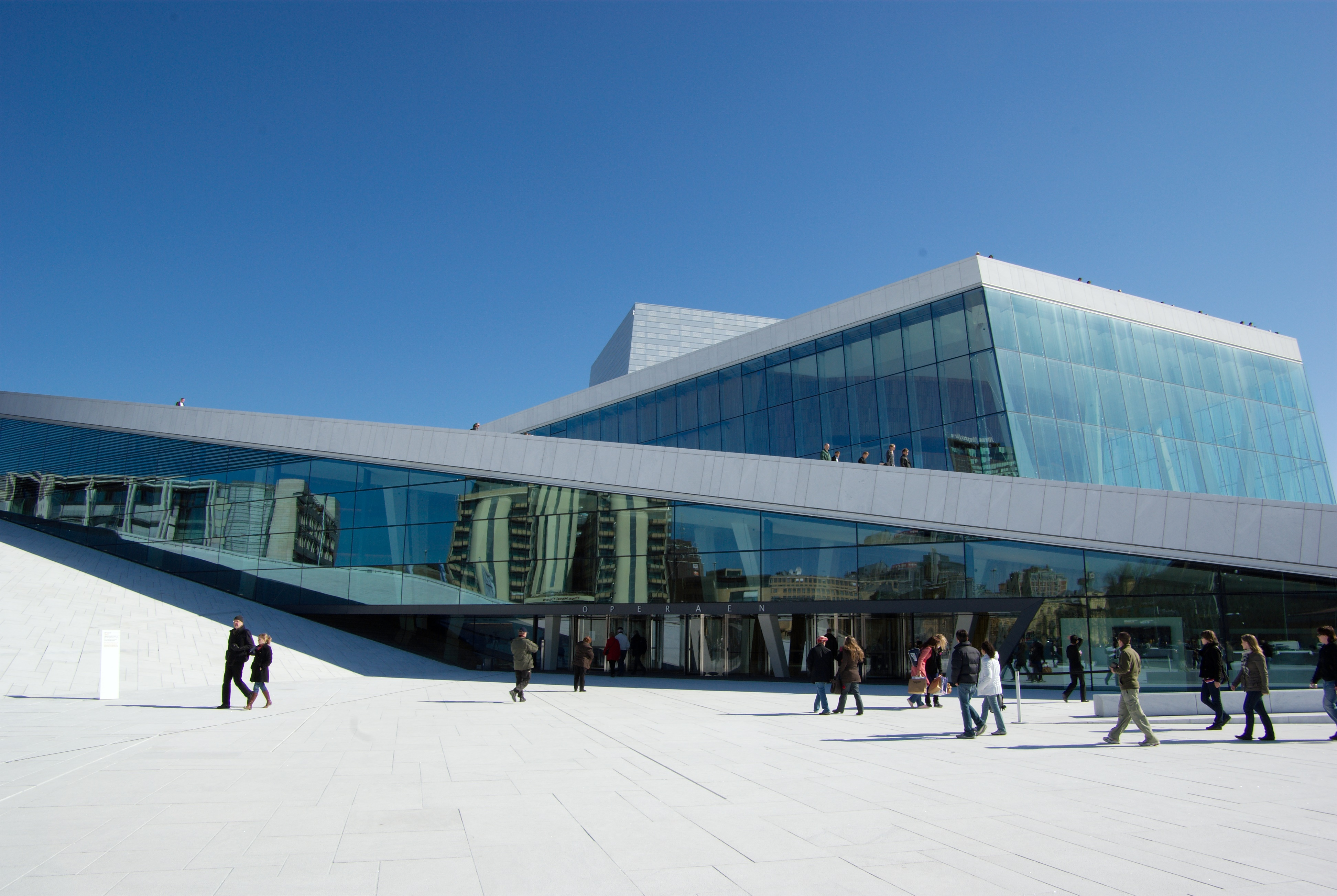 Oslo Opera House Bjørvika, Oslo, Norway, April 2008 © 2005, 2006, 2007 by Bjørn Erik Pedersen Licensing:[edit]